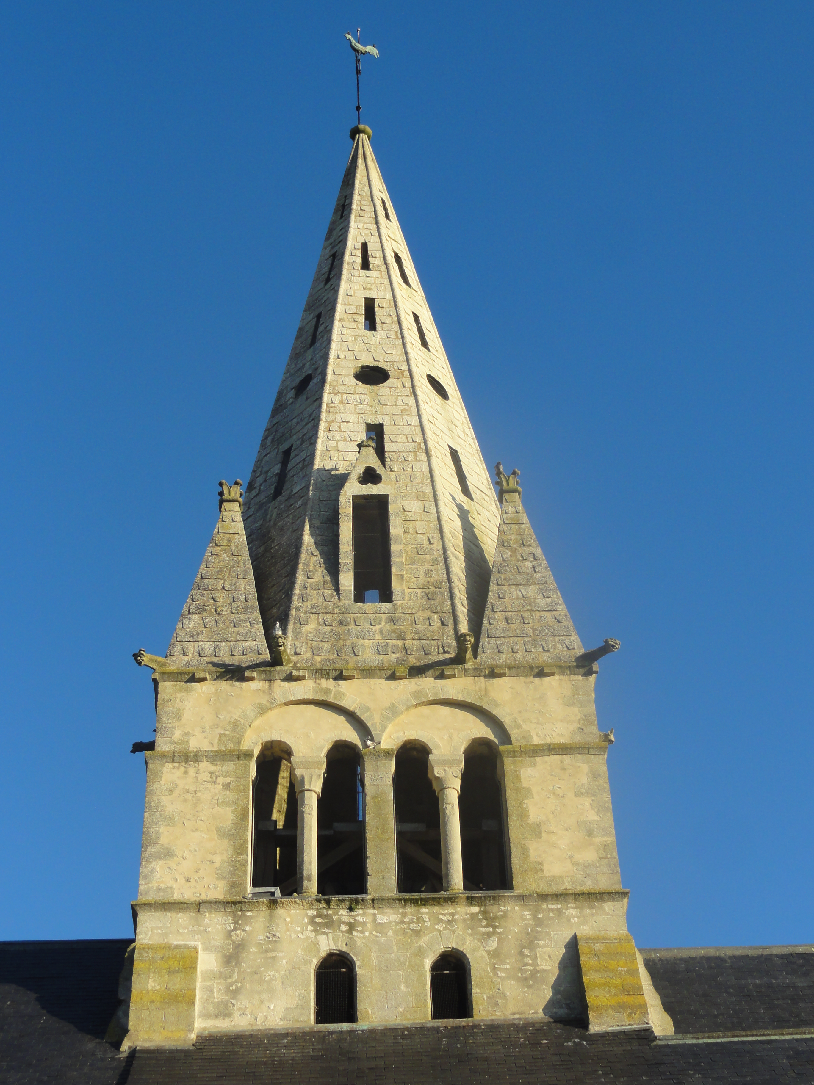 Clocher, vue depuis le sud.